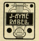 Ex-libris d'autor desconegut amb el que firmava alguns textos Joaquim Ayné i Rabell a la revista Catalunya Artística.